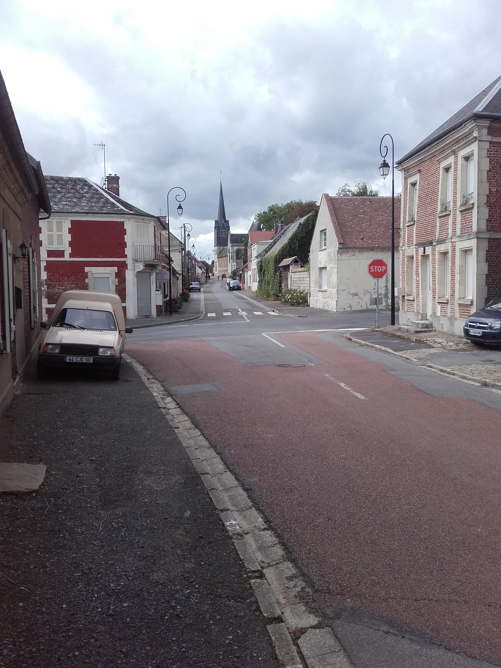 Vue de Baboeuf depuis la rue Martin